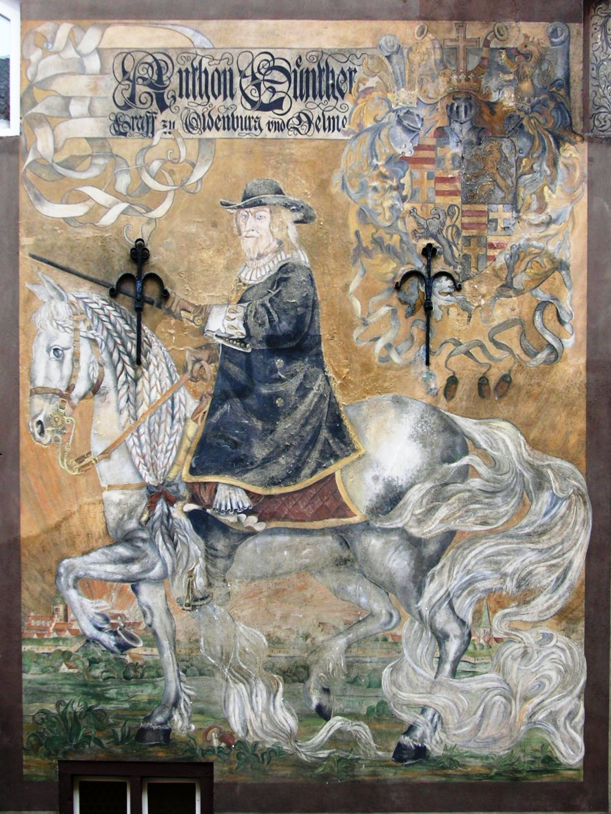 Graf Anton Günther auf dem Apfelschimmel Kranich, Malerei an der Aussenseite des „Hotel Graf Anton Günther“